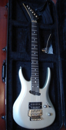 Imagem de uma guitarra Tagima modelo Zero, de propriedade de Renato Gonnelli.